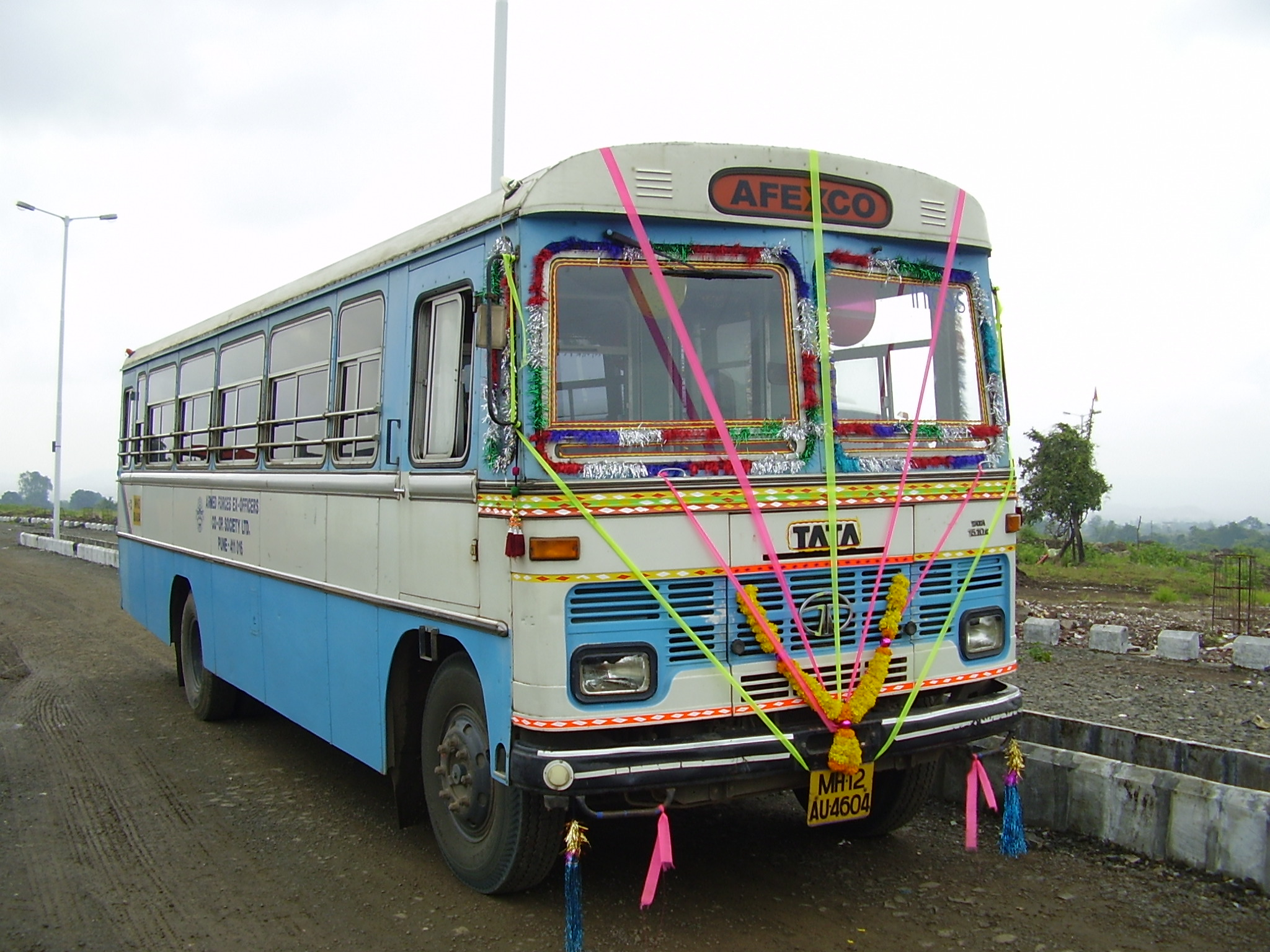 Ein Tata 1510c von Infosys, geschmückt für das Dussera-Festival in Pune.